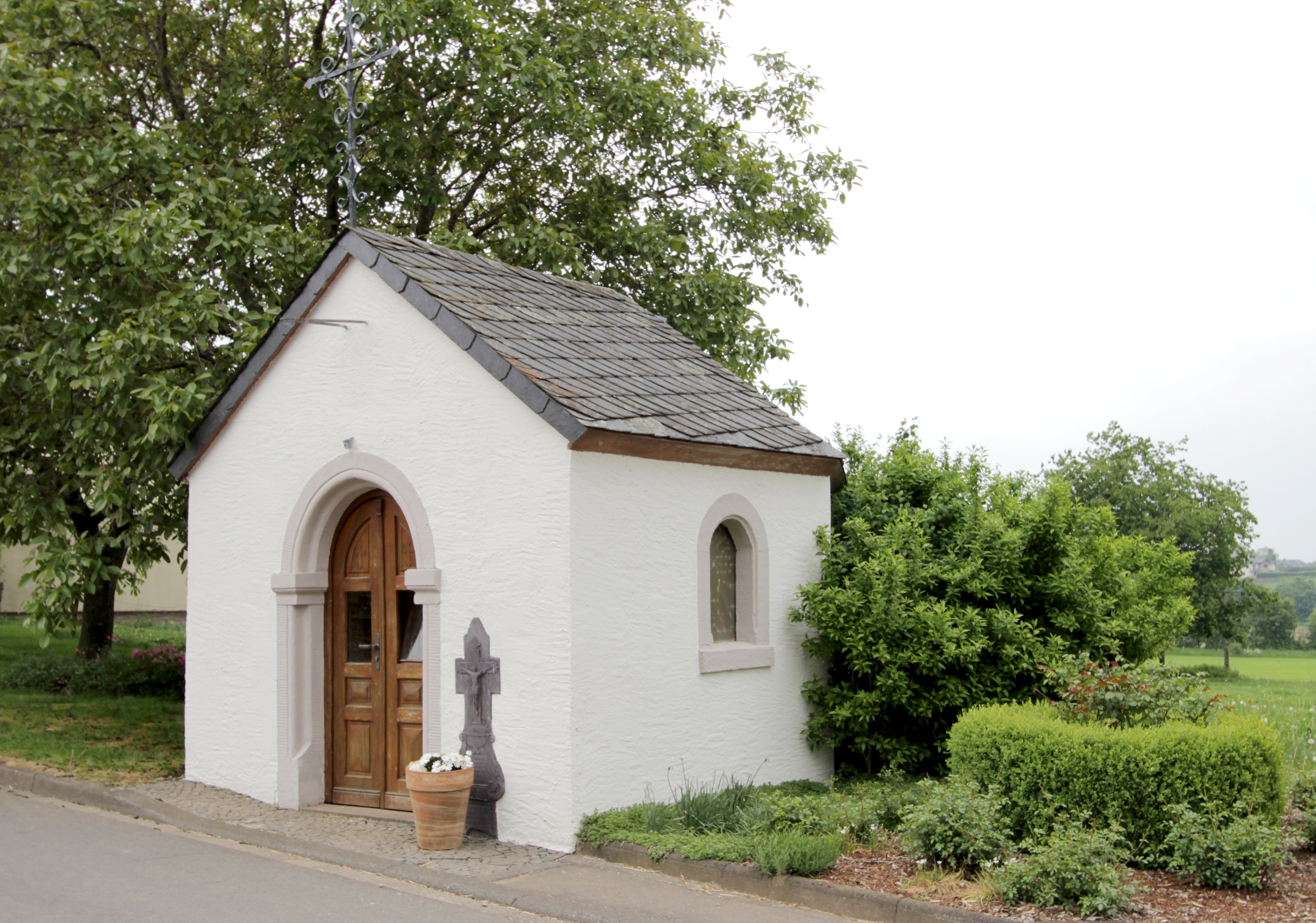 54689 Olmscheid, Hauptstraße gegenüber Nr. 13. Hauskapelle der Familie Hankes-Schares. Kleiner Putzbau, wohl vom Anfang des 20. Jahrhunderts; in der Giebelwand aufwändiges nachbarockes Balkenkreuz, Schiefer, bezeichnet 1811. Aufnahme von 2018.